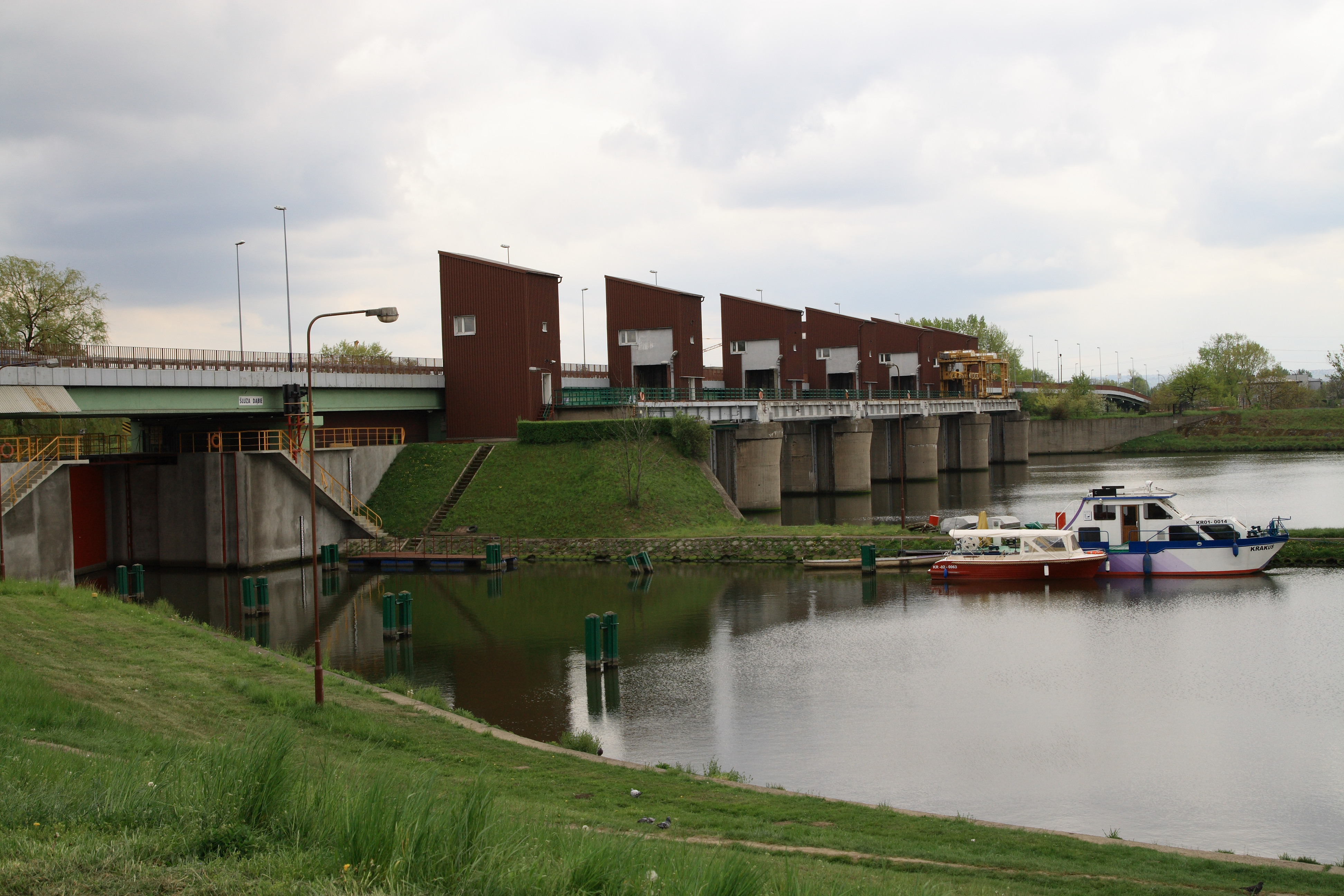 Stopień wodny na Wiśle, w Krakowie - Dąbiu.